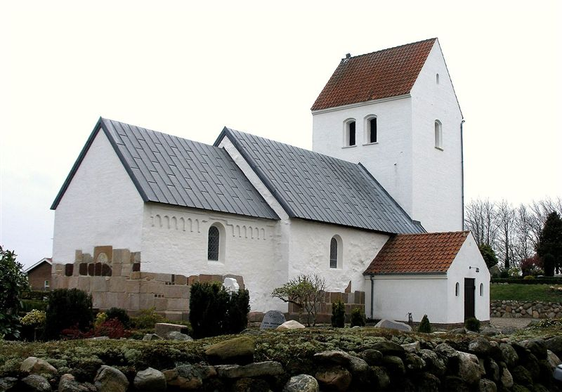 Ølstrup Kirke i Danmark. Ølstrup kirke